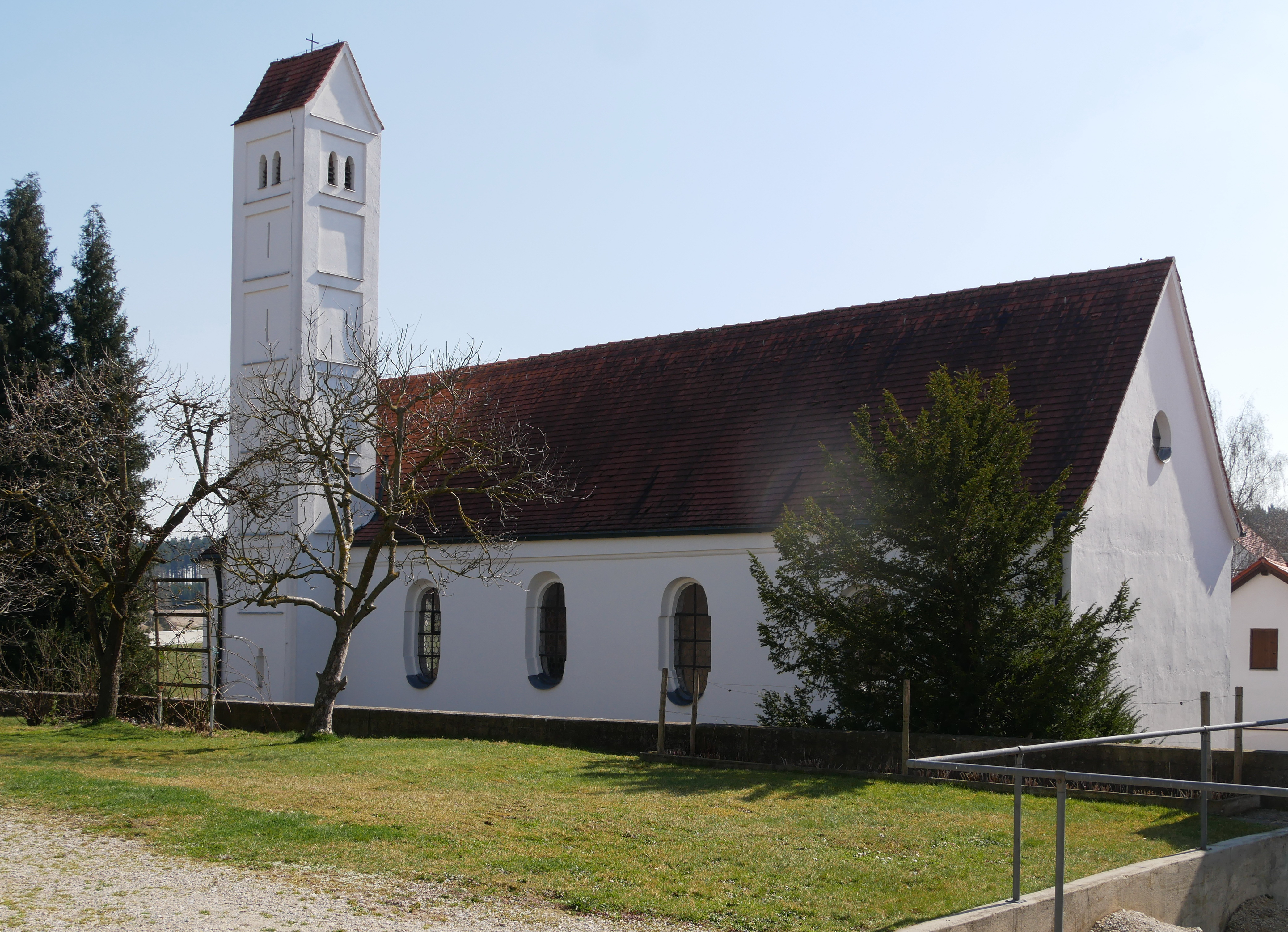 Dasing, Ortsteil Tattenhausen, St.-Peter-und Paul-Weg 1, Katholische Filialkirche St. Peter und Paul. Ansicht aus NW